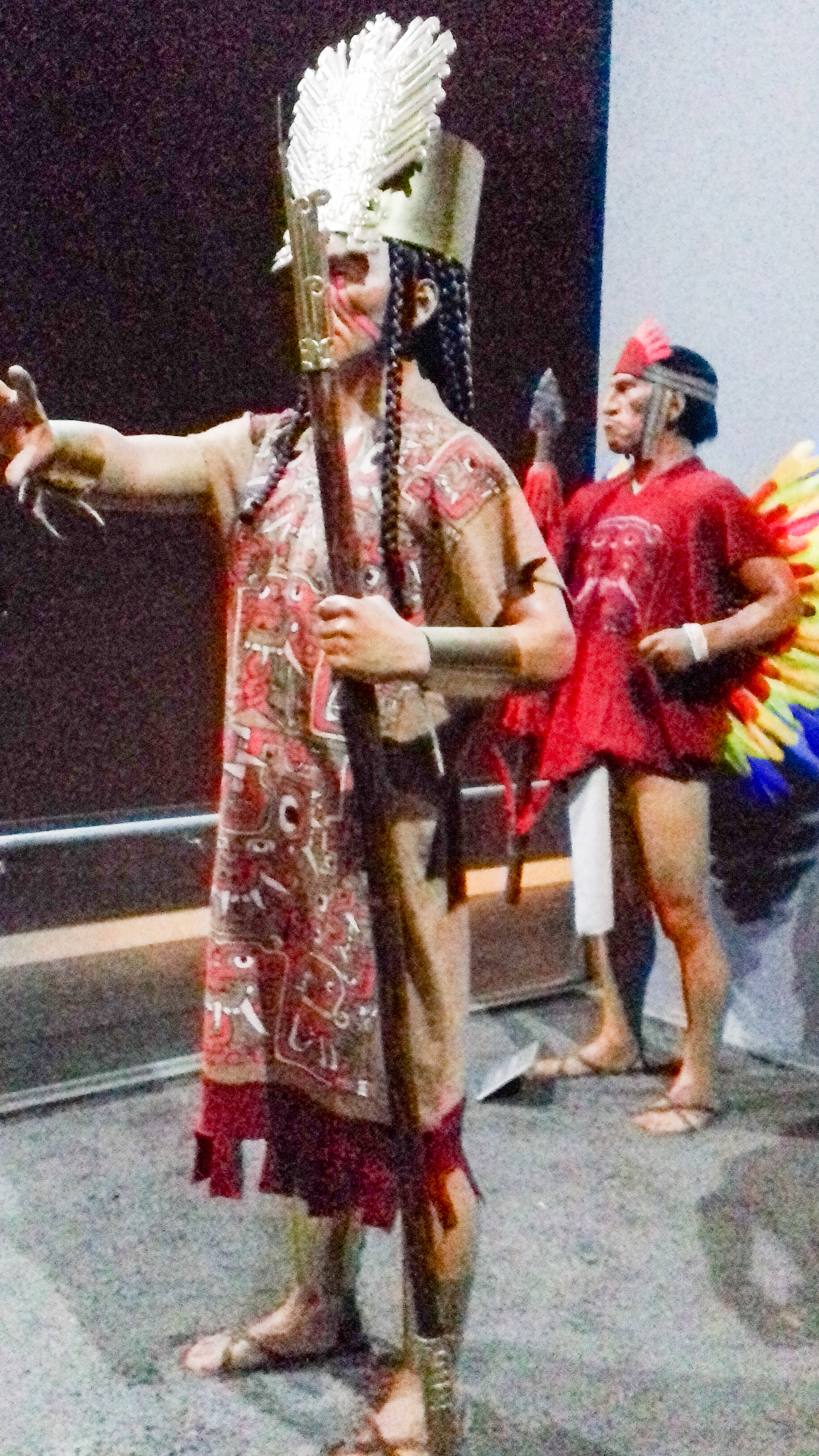 Un prêtre-soldat.